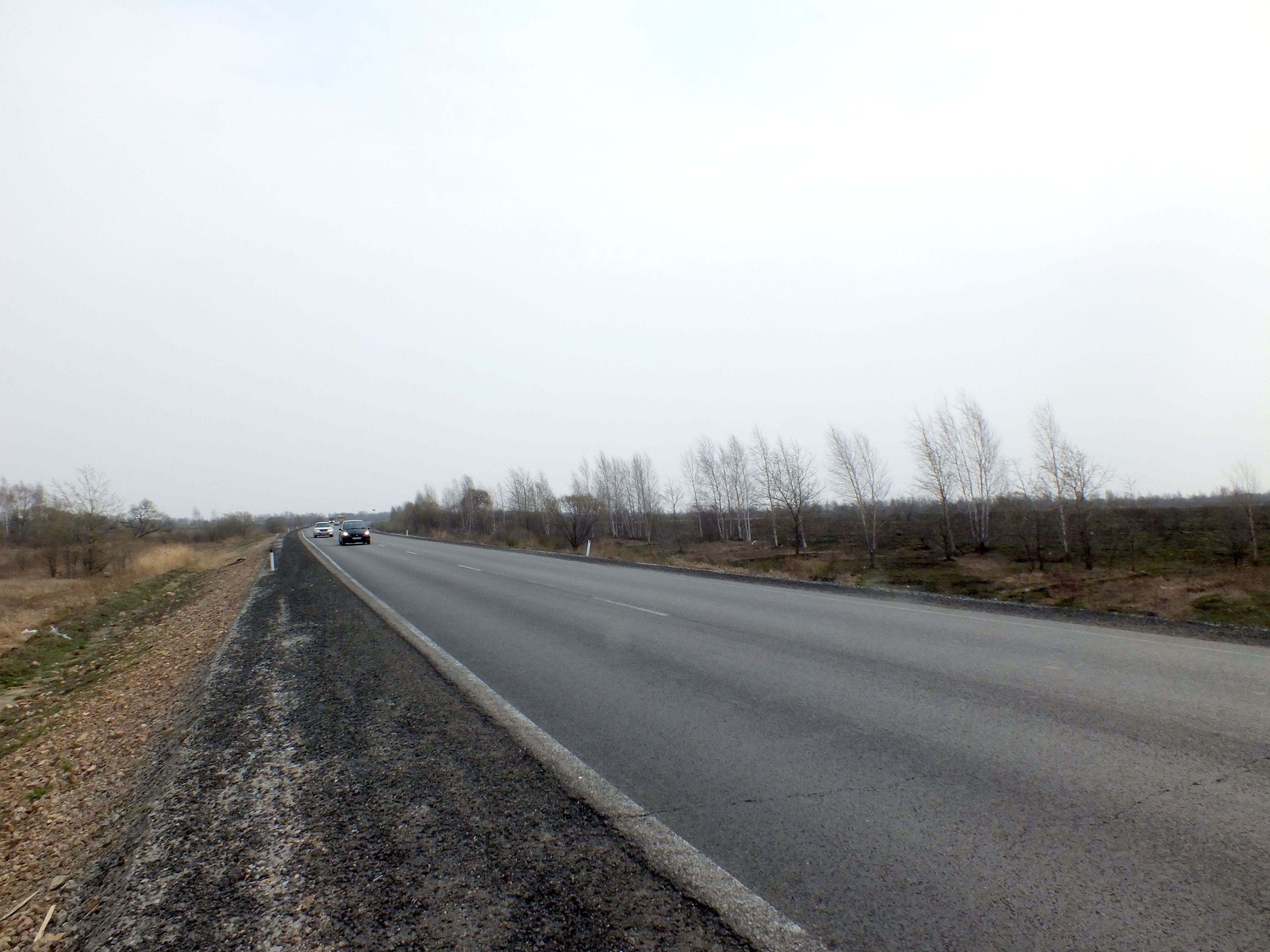 Федеральная трасса Амур в окрестностях пос Приамурский ЕАО апрель 2014